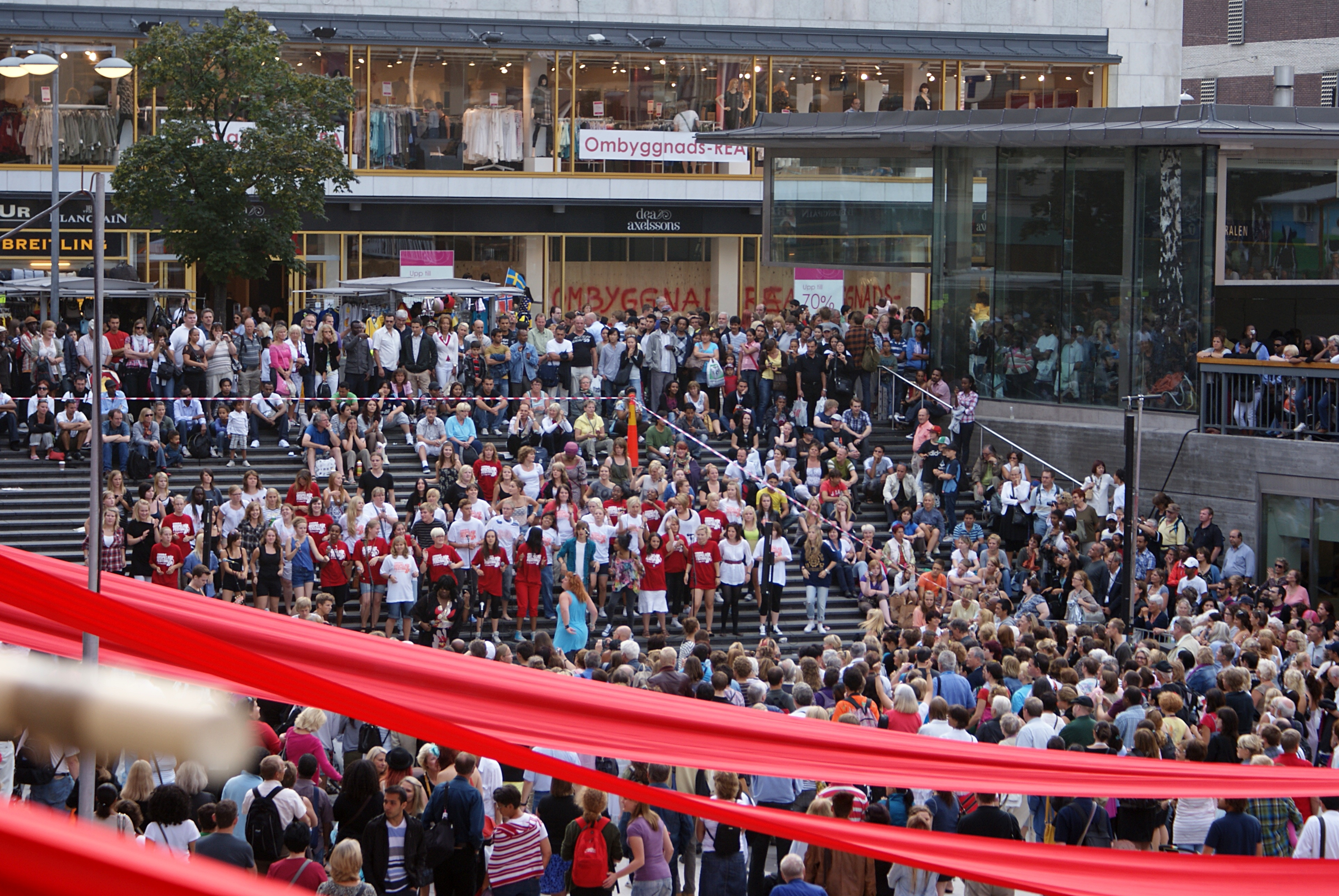 Stockholms Kulturfestval 2010